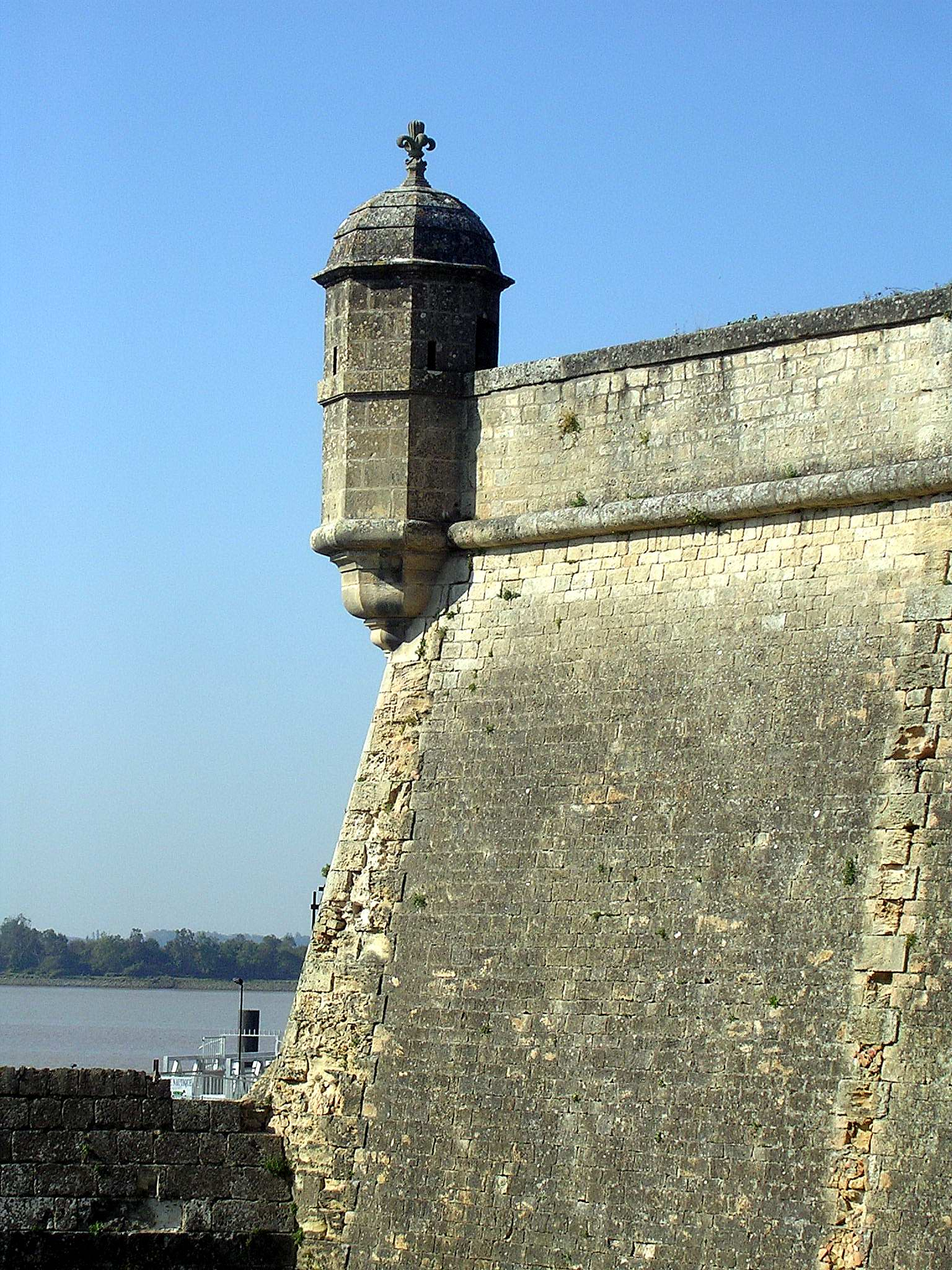 Echauguette de la citadelle de Blaye (Gironde, France)